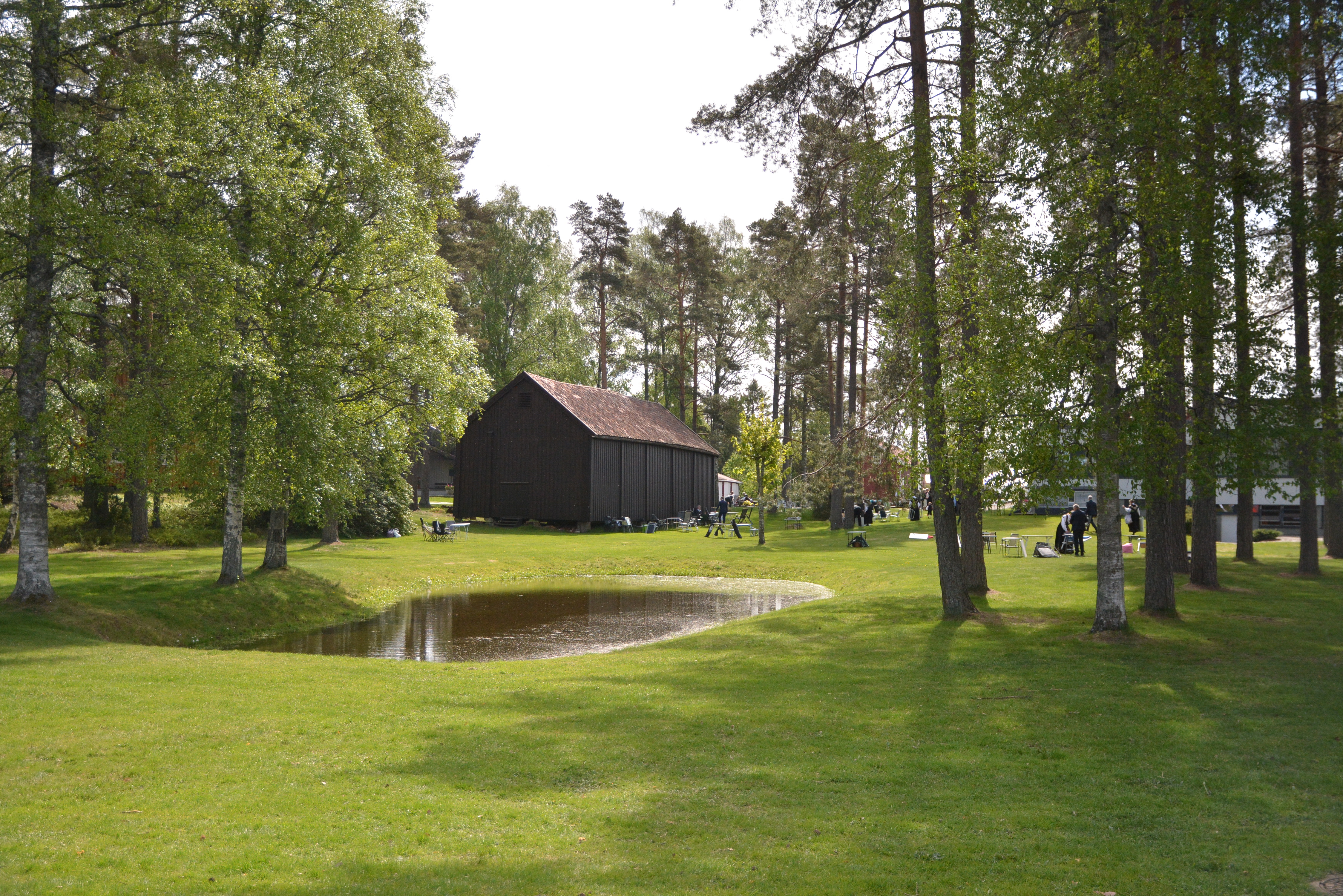 Skiptvet bygdetun. Foto: Glenn Thomas Nilsen